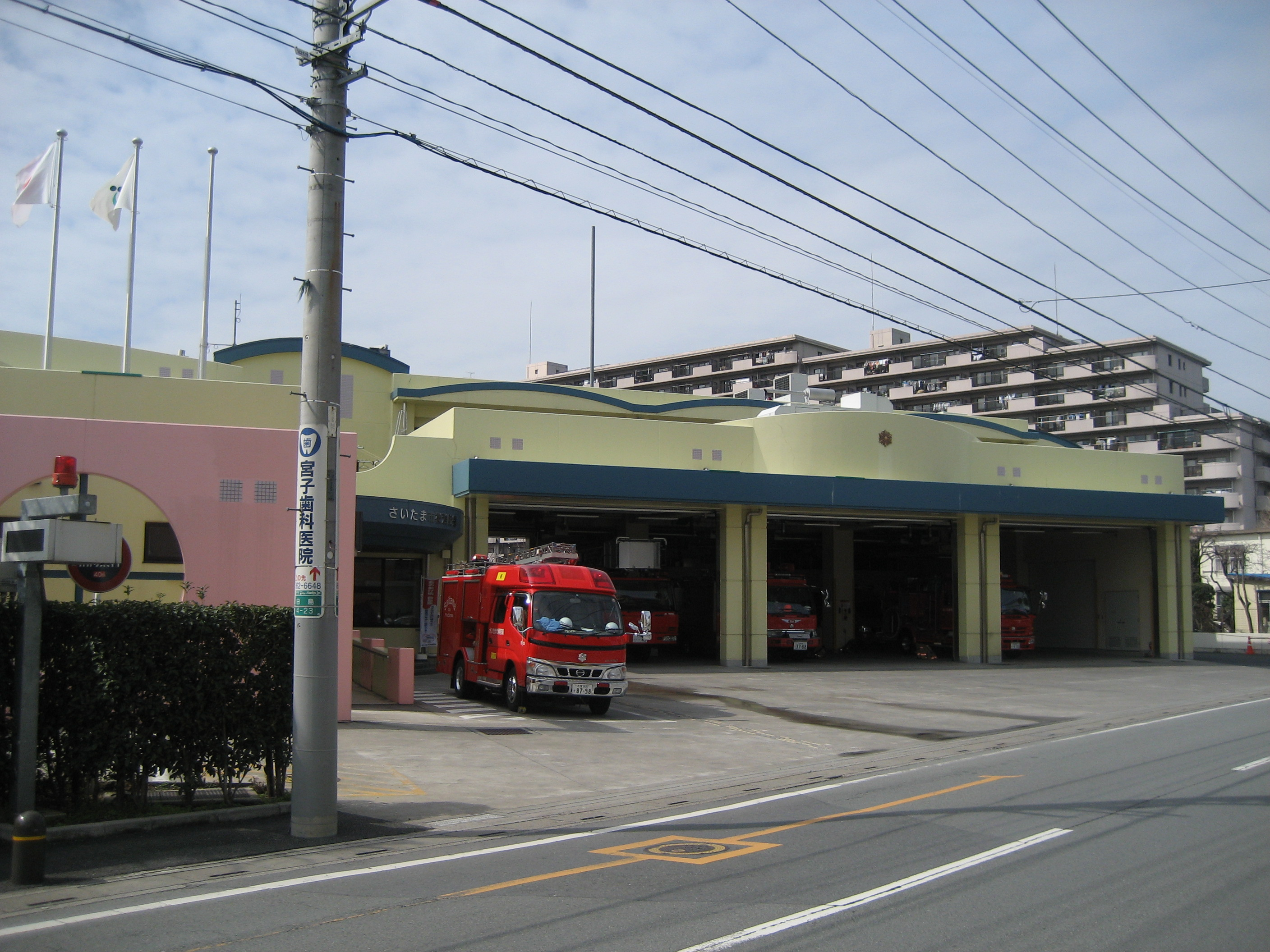 さいたま市消防局桜消防署